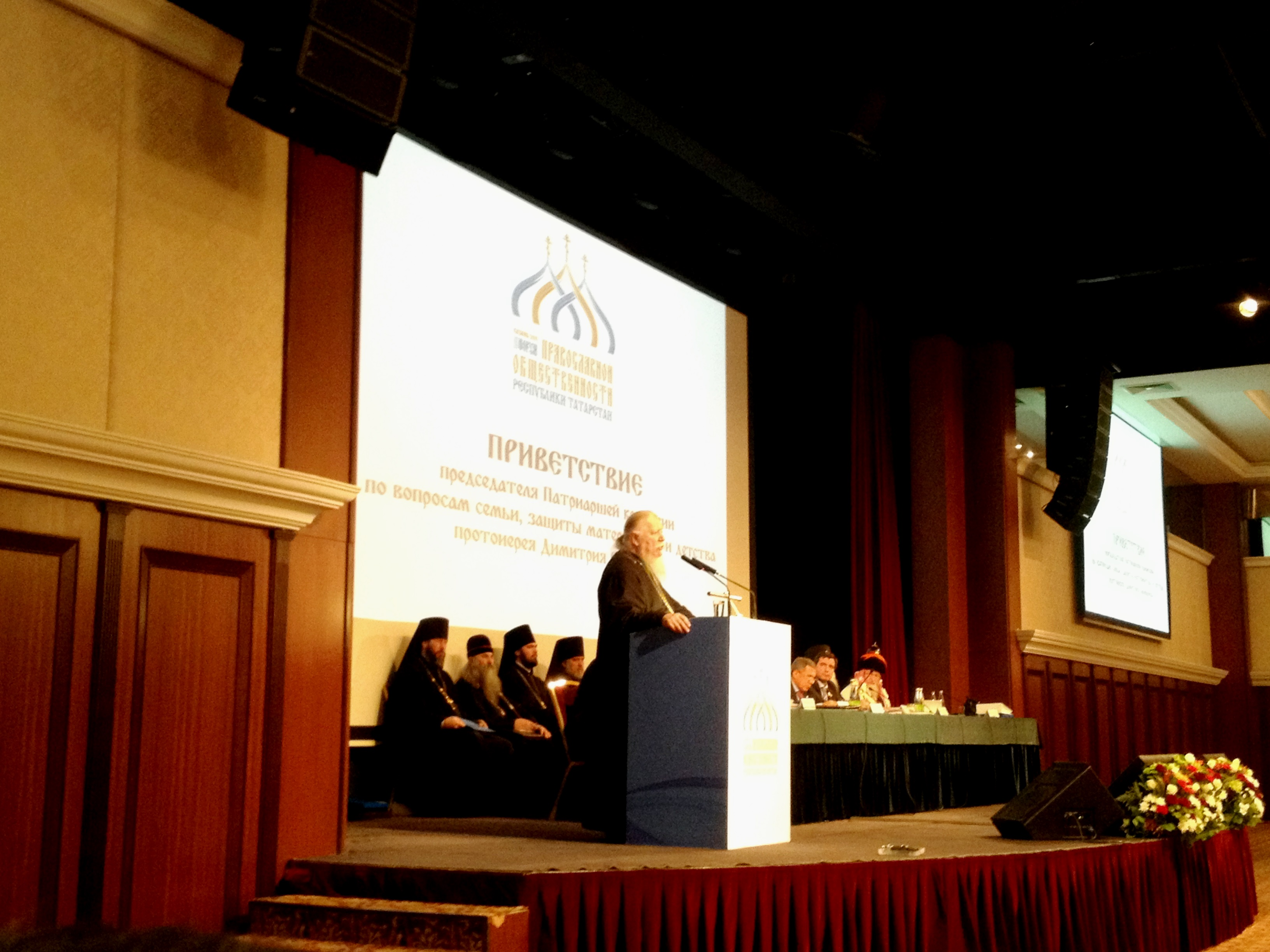 Выступление председателя Патриаршей комиссии по вопросам семьи, защиты материнства и детства протоиерея Д. Н. Смирнова на II Форуме православной общественности Республики Татарстан (г. Казань, ГТРК "Корстон", 26 ноября 2015 г.)